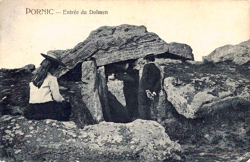 Tumulus von Mousseaux (franz. Dolmen des Mousseaux) ist eine Megalithanlage beim Hafen von Pornic, an der Côte de Jade, südlich von St. Nazaire. Aufnahme um 1900